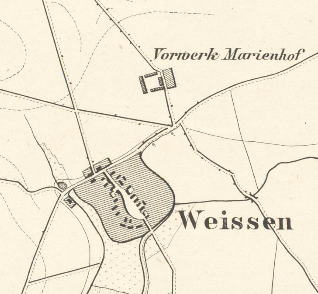 Weißen und Marienhof, Gemeinde Niederer Fläming, Landkreis Teltow-Fläming, Brandenburg auf der Topographischen Karte 1:25.000 von 1874